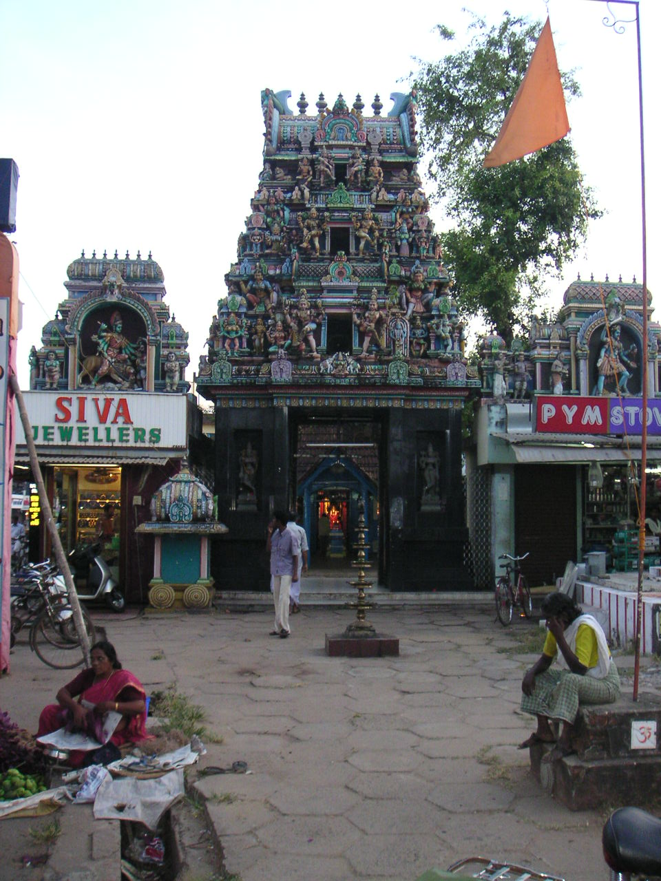 Hindu temple in Alappuzha, Kerala.